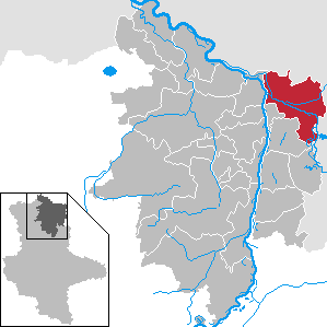 Havelberg im Landkreis Stendal, Sachsen-Anhalt